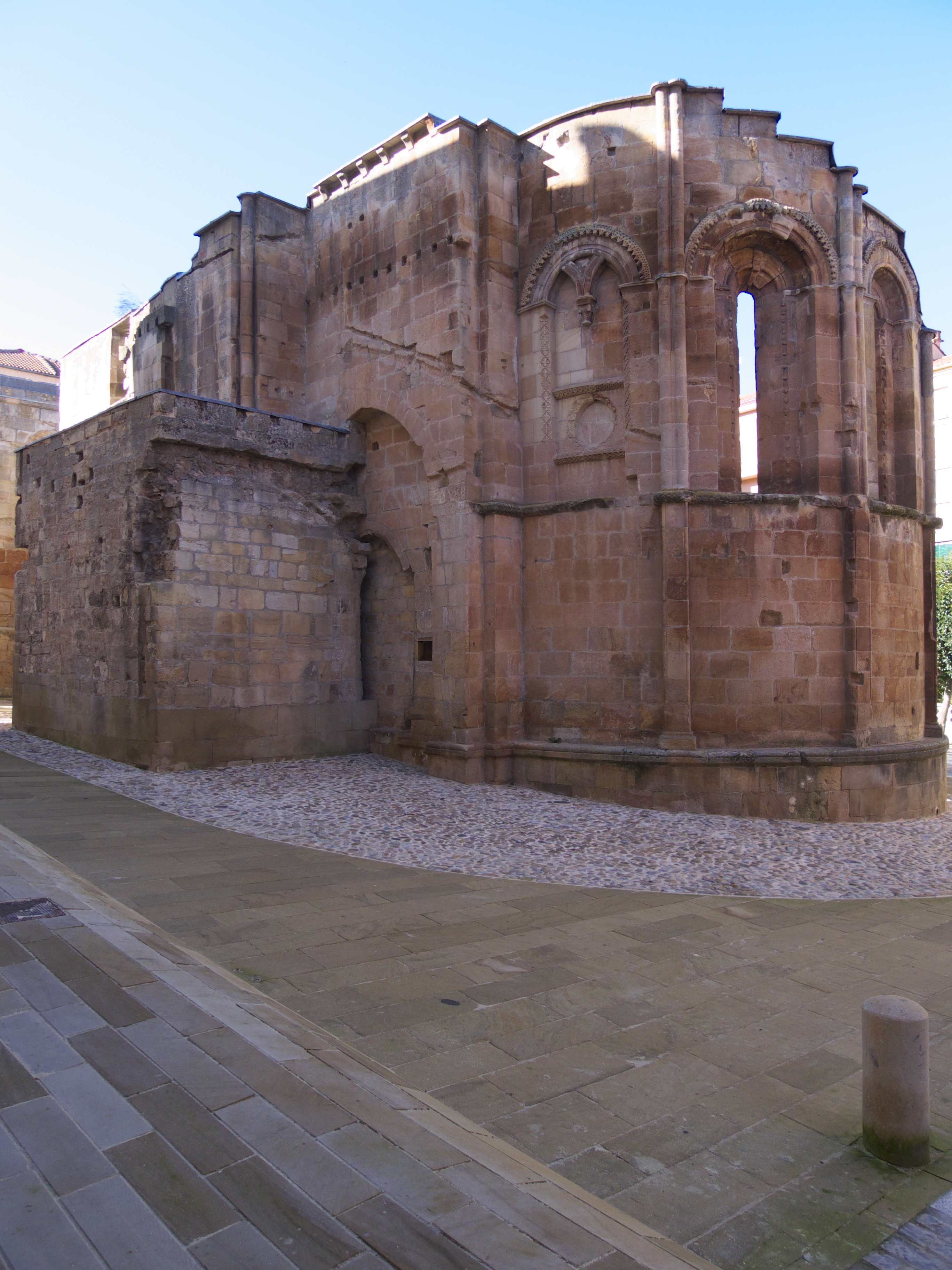 Restos del ábside de principios del XIII, de tipología semejante al de San Juan de Rabanera. Esta iglesia, de una sola nave, sirvió de modelo para otras de Soria. Afortunadamente, su espléndida portada se conserva en la iglesia de San Juan de Rabanera.